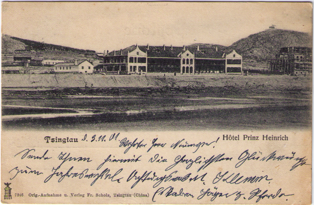 青岛前海海因里希亲王饭店远景